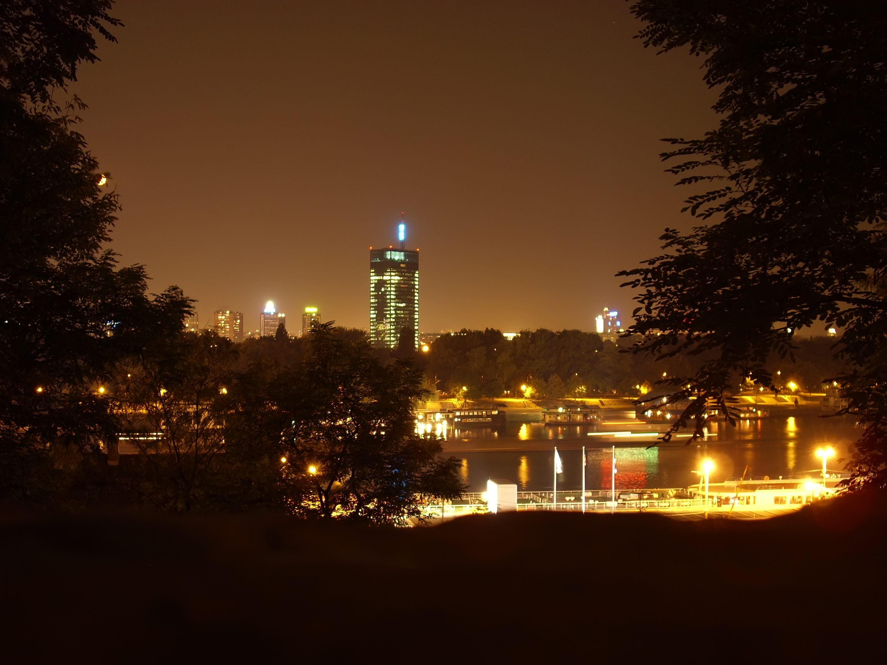 novi beograd